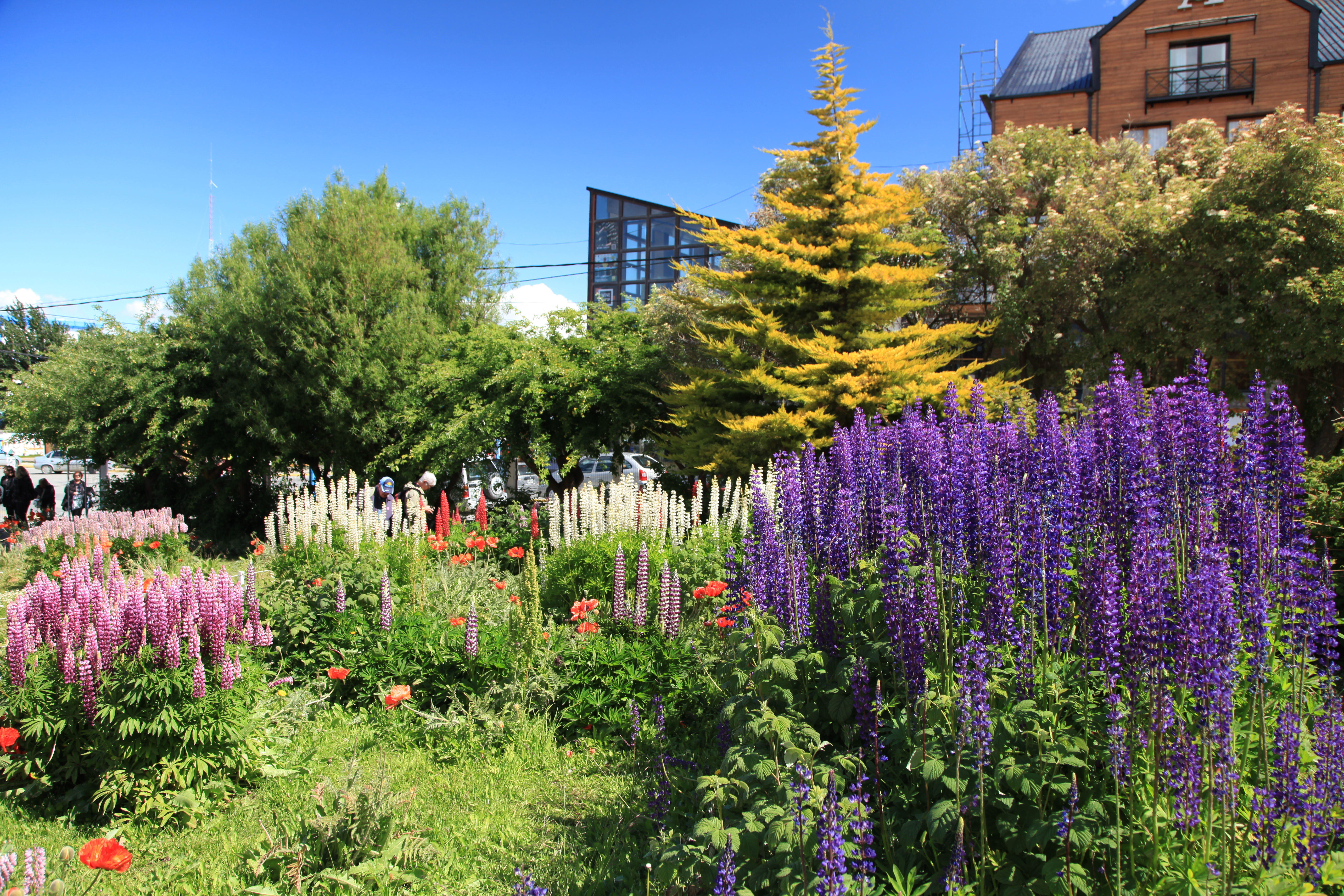 Beside the Museo del Fin del Mundo.